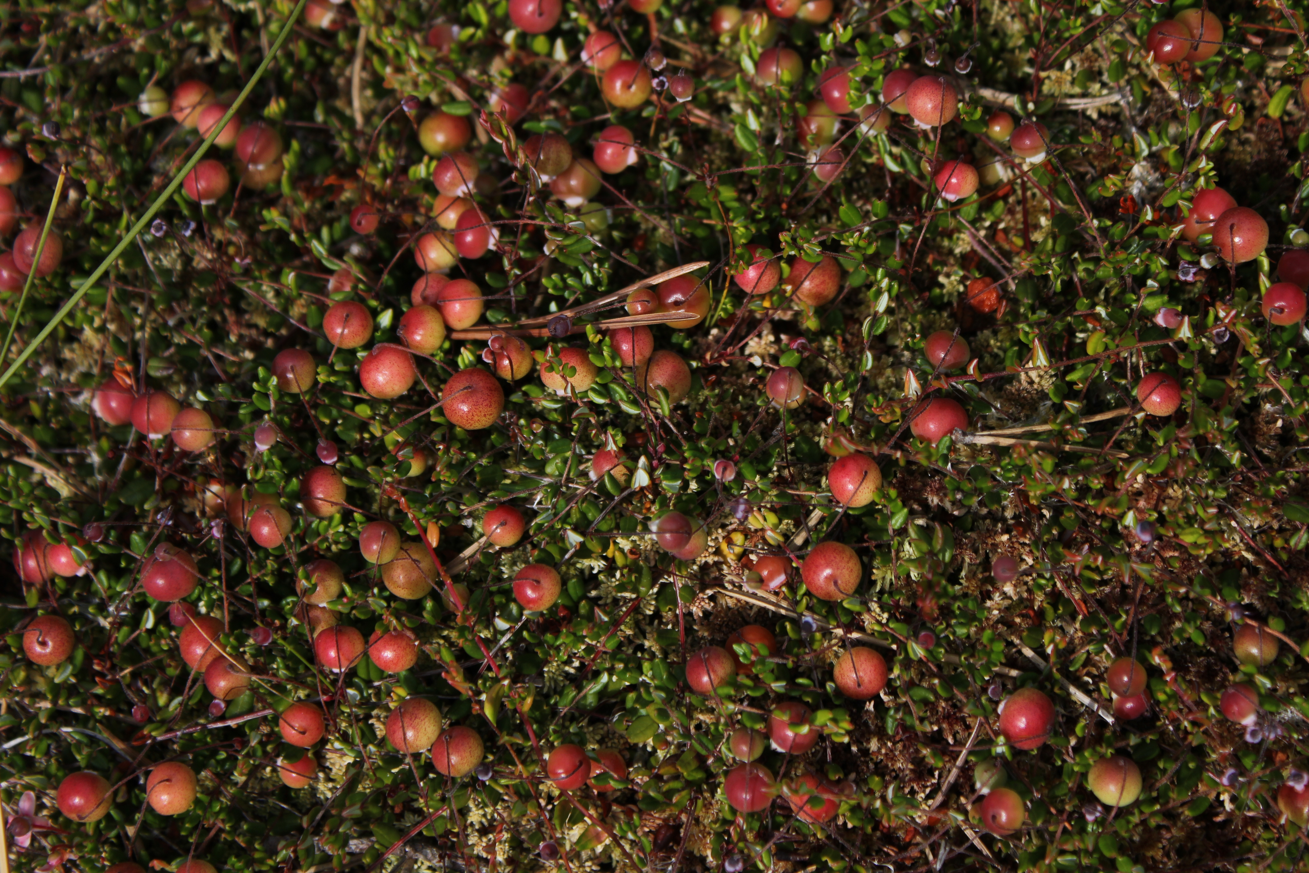 Gewöhnliche Moosbeere im Schwarzen Moor in der Rhön, Germany Česky=Klikva bahenní Dansk=Almindelig Tranebær English=Vaccinium oxycoccos Español=Vaccinium oxycoccos فارسی=کرنبری باتلاقی Suomi=Isokarpalo Magyar=Tőzegáfonya 日本語=ツルコケモモ Lietuvių=Paprastoji spanguolė Nederlands=Kleine veenbes Norsk=Vanlig tranebær Polski=Żurawina błotna Svenska=Tranbär Türkçe=Vaccinium oxycoccos Tiếng Việt=Ngài hoàng đế nhỏ